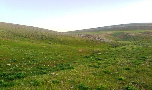 تپه های روستای تات نشین برزل آباد